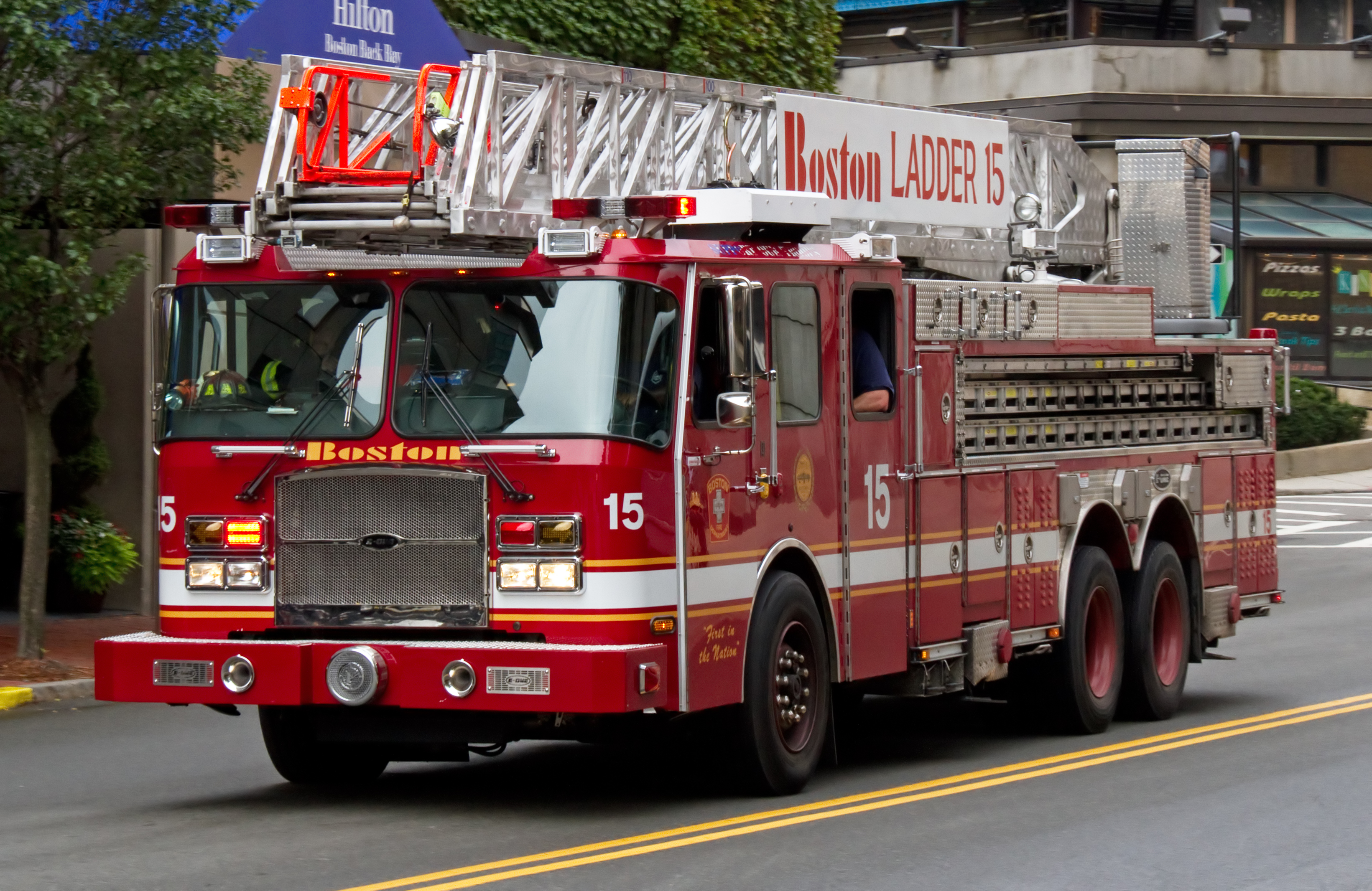 Fire Engine Ladder 15